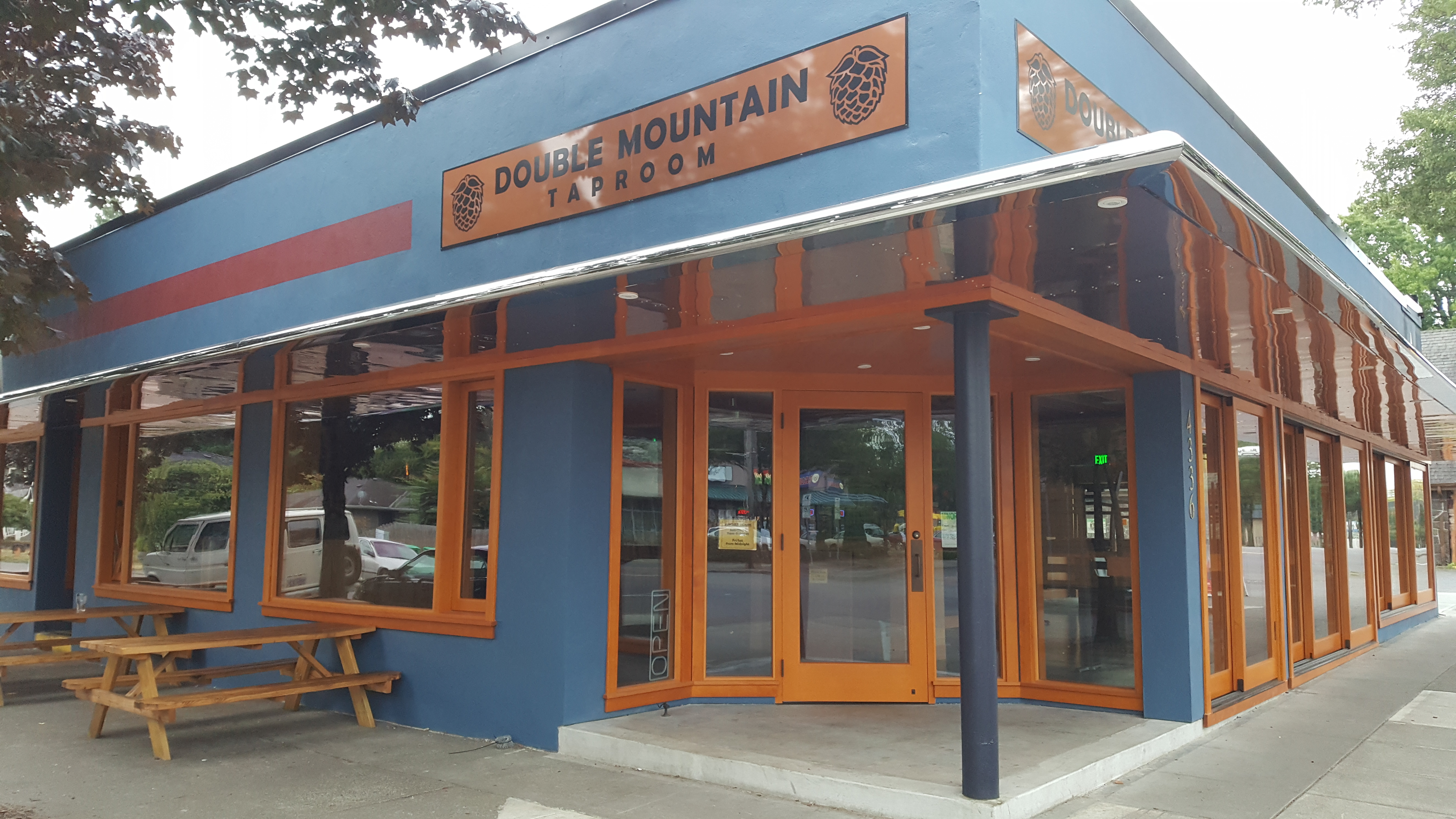 Double Mountain